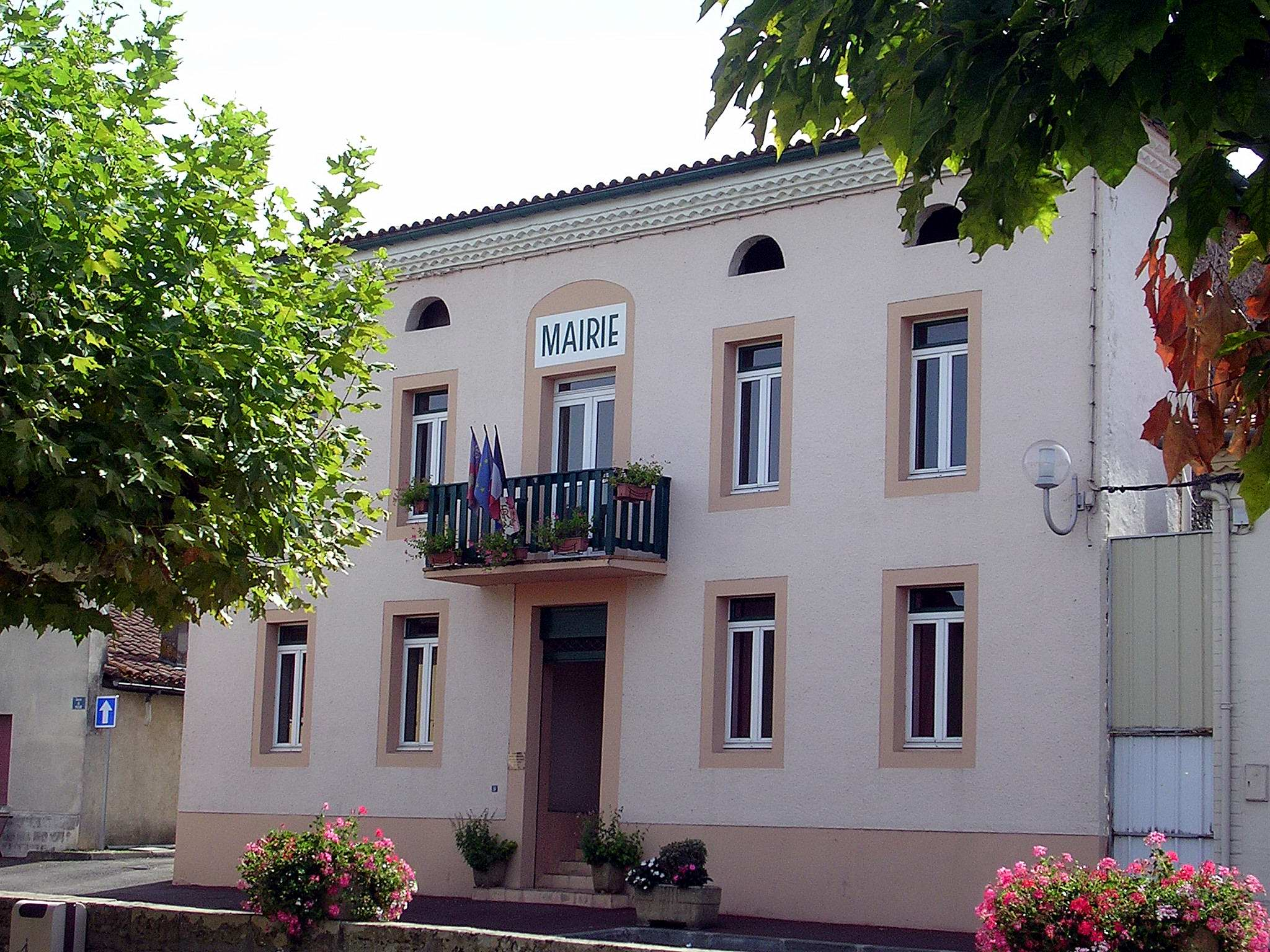 Mairie de la commune de Capmgnae, dans le département français des Landes